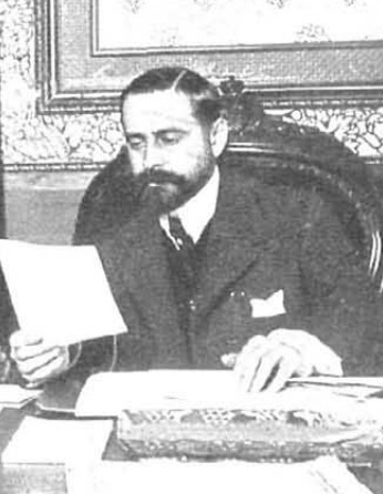 El subsecretario de Gobernación, señor conde del Moral de Calatrava, despachando con don Emilio Moreno, jefe de la sección de orden público (FOT. NUEVO MUNDO POR CAMPÚA).